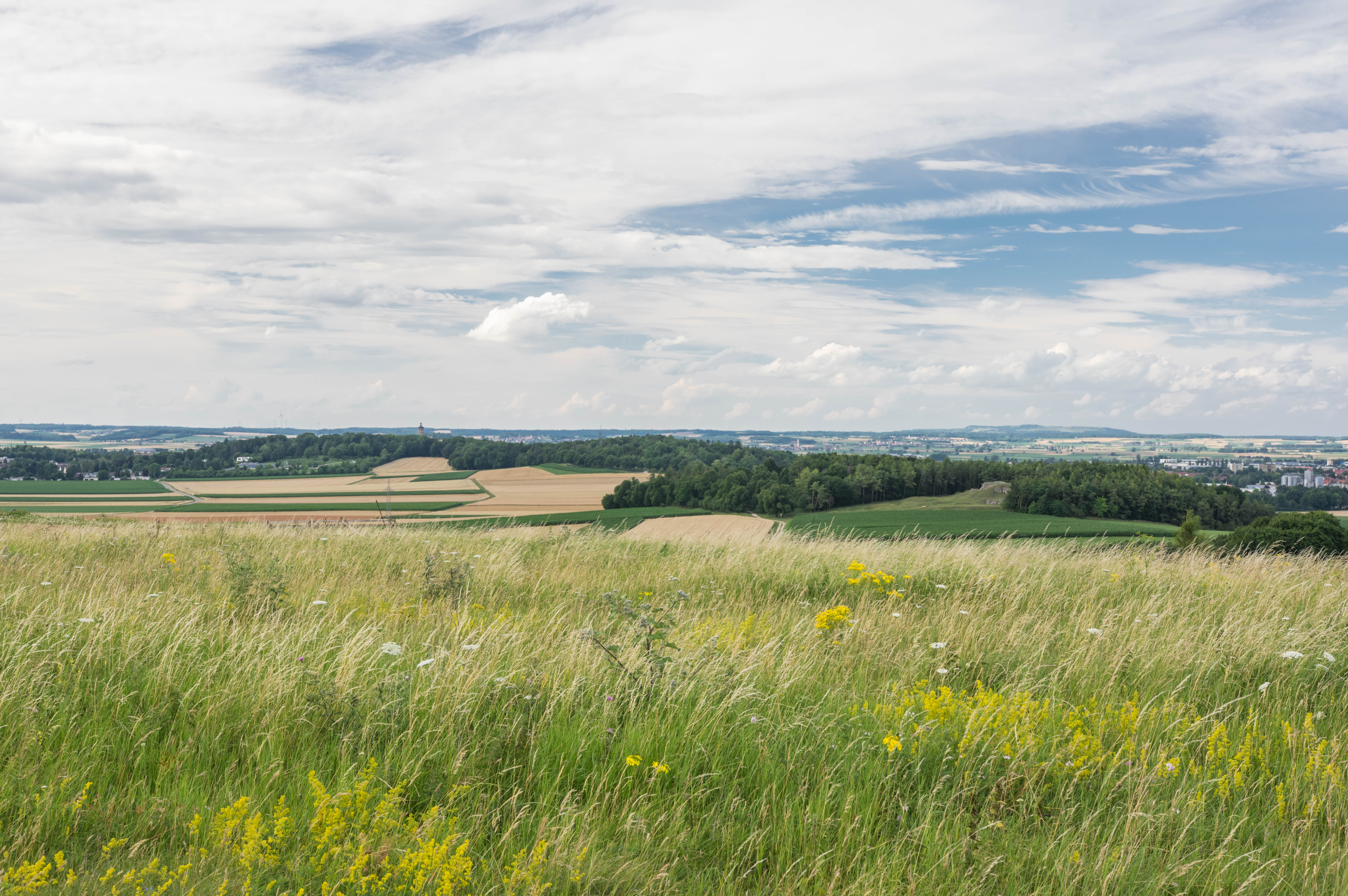 Blick von Hürnheim aus zum Adlersberg (Vordergrund) mit dem Felsmassiv aus Ries-Impakt, im Hintergrund die Marienhöhe zu der der Adlersberg gehört. Ganz links mit dem Nördlinger Daniel der Galgenberg. Naturdenkmal, Geotop, Landschaftsschutzgebiet, Bodendenkmal